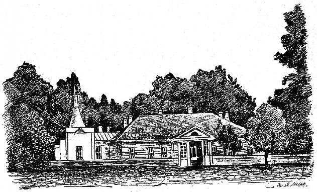 Беларуская (тарашкевіца): Старабарысаў (Starabarysaŭ), сядзіба Радзівілаў (Radzivił)